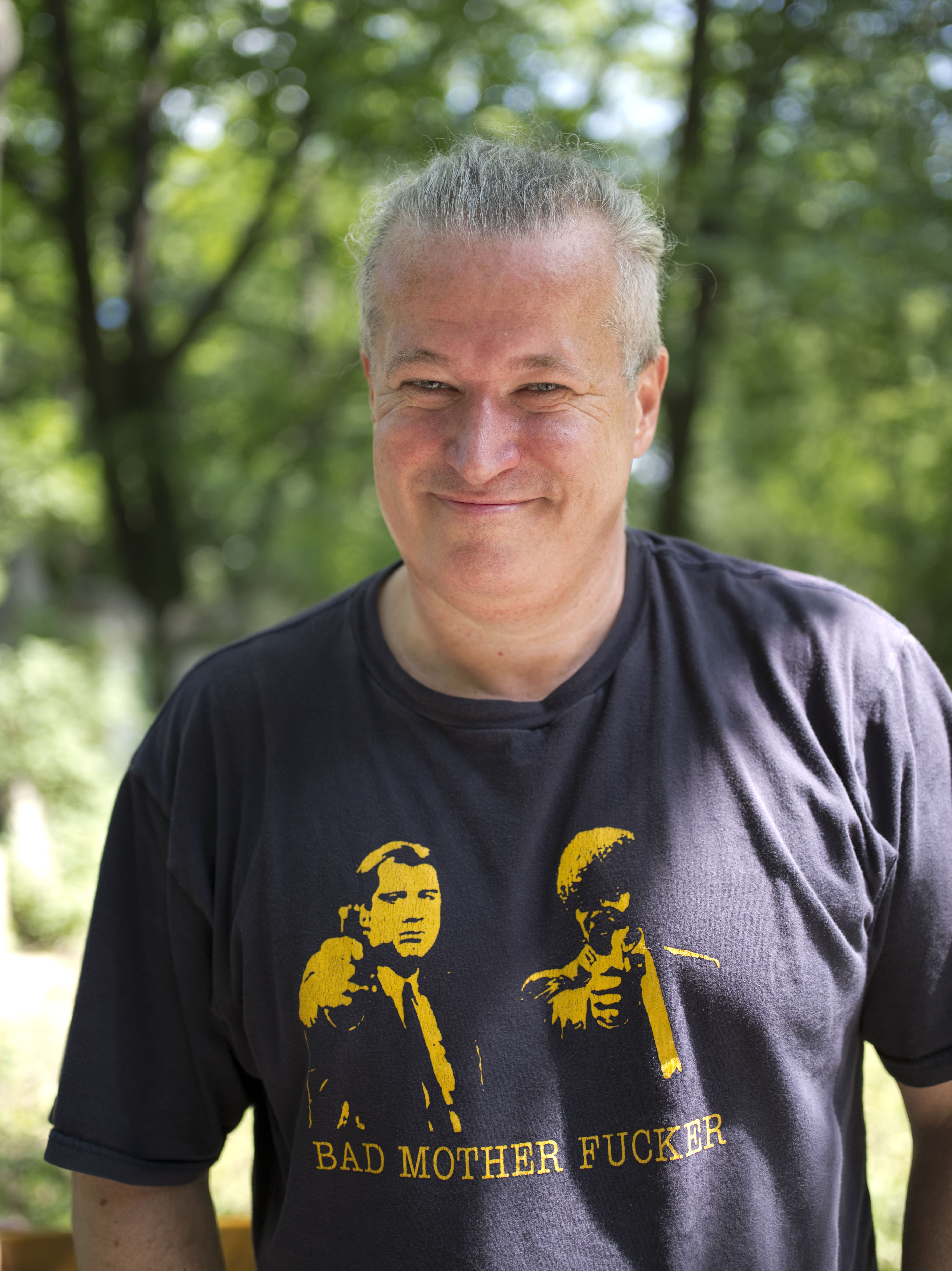 Foto: Moritz Schell Abdruck honorafrei bei Namensnennung